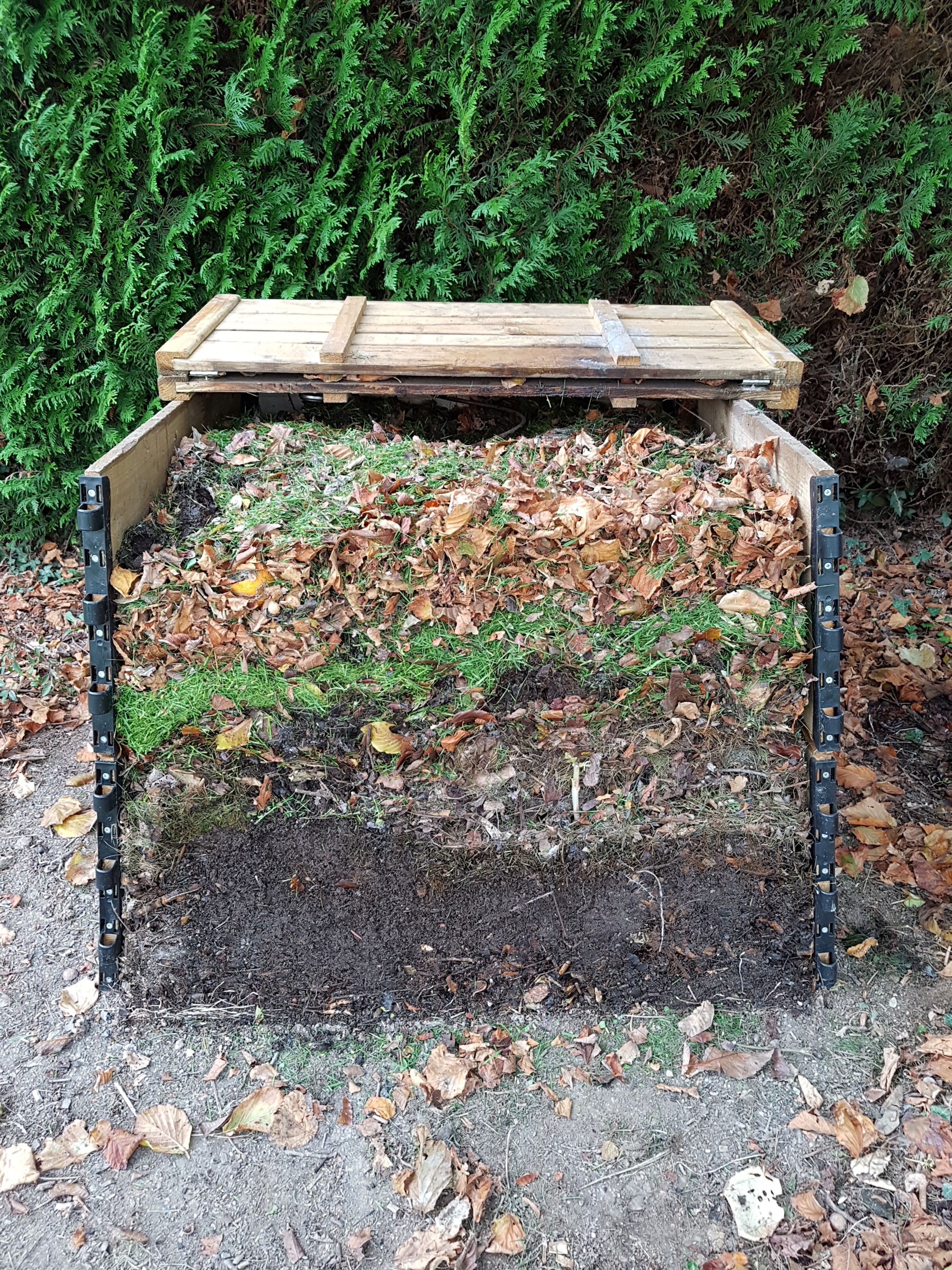 Couches de mâturation dans un composteur domestique